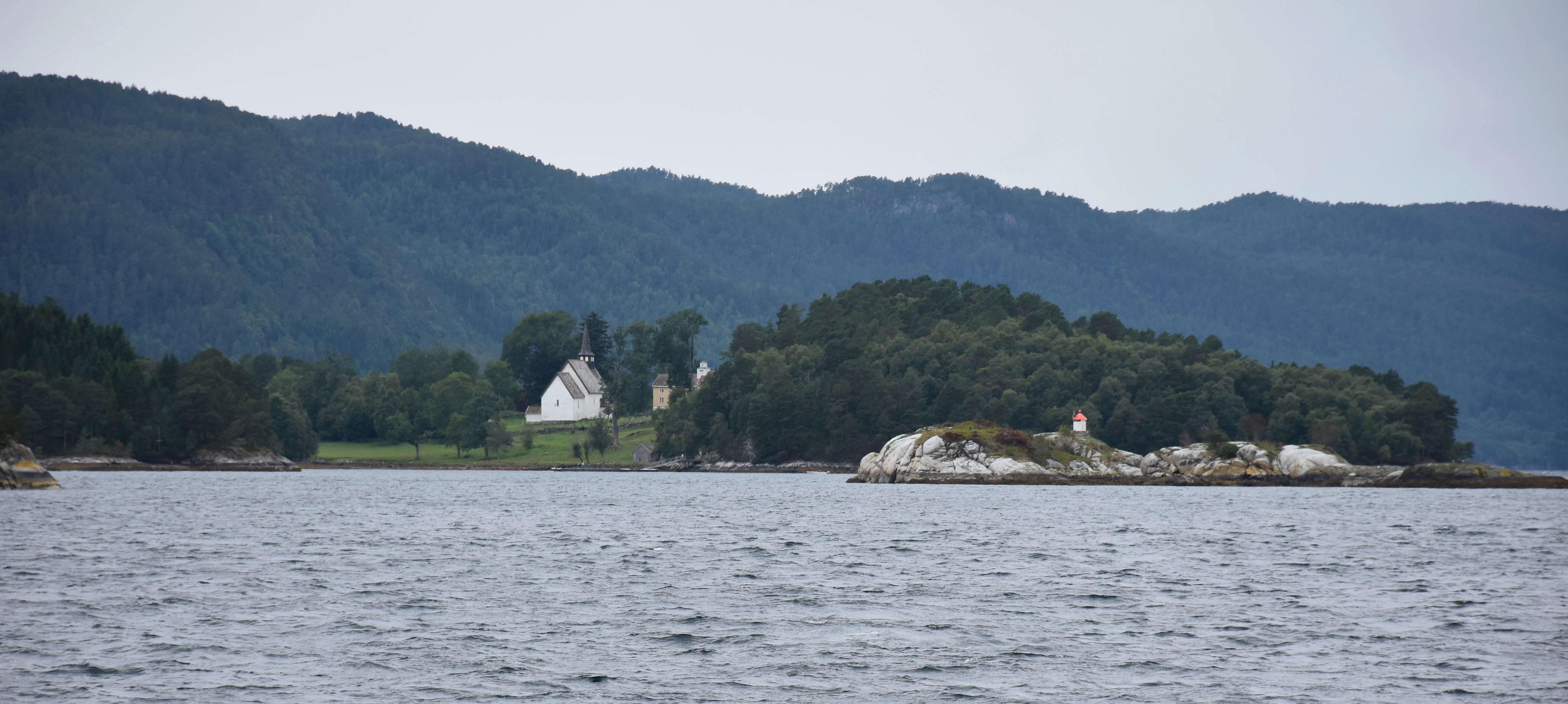 Veøya med Veøy gamle kirke